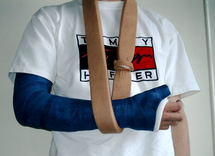 armsling with cast